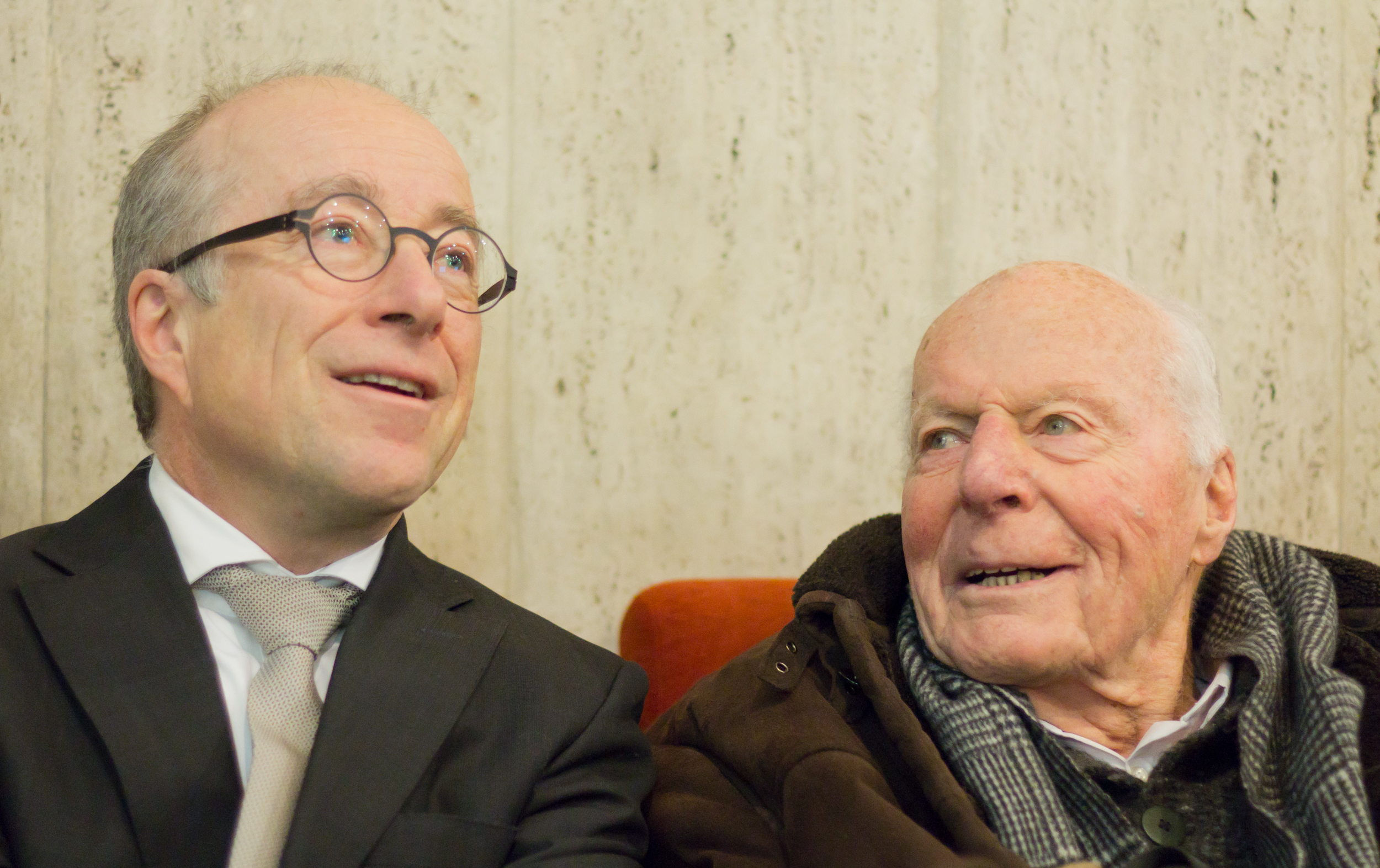 Paul Böhm (* 1959) und sein Vater Gottfried Böhm (* 1920), deutsche Architekten, bei der Premiere des Films „Die Böhms – Architektur einer Familie“ im Weisshaus-Kino, Köln